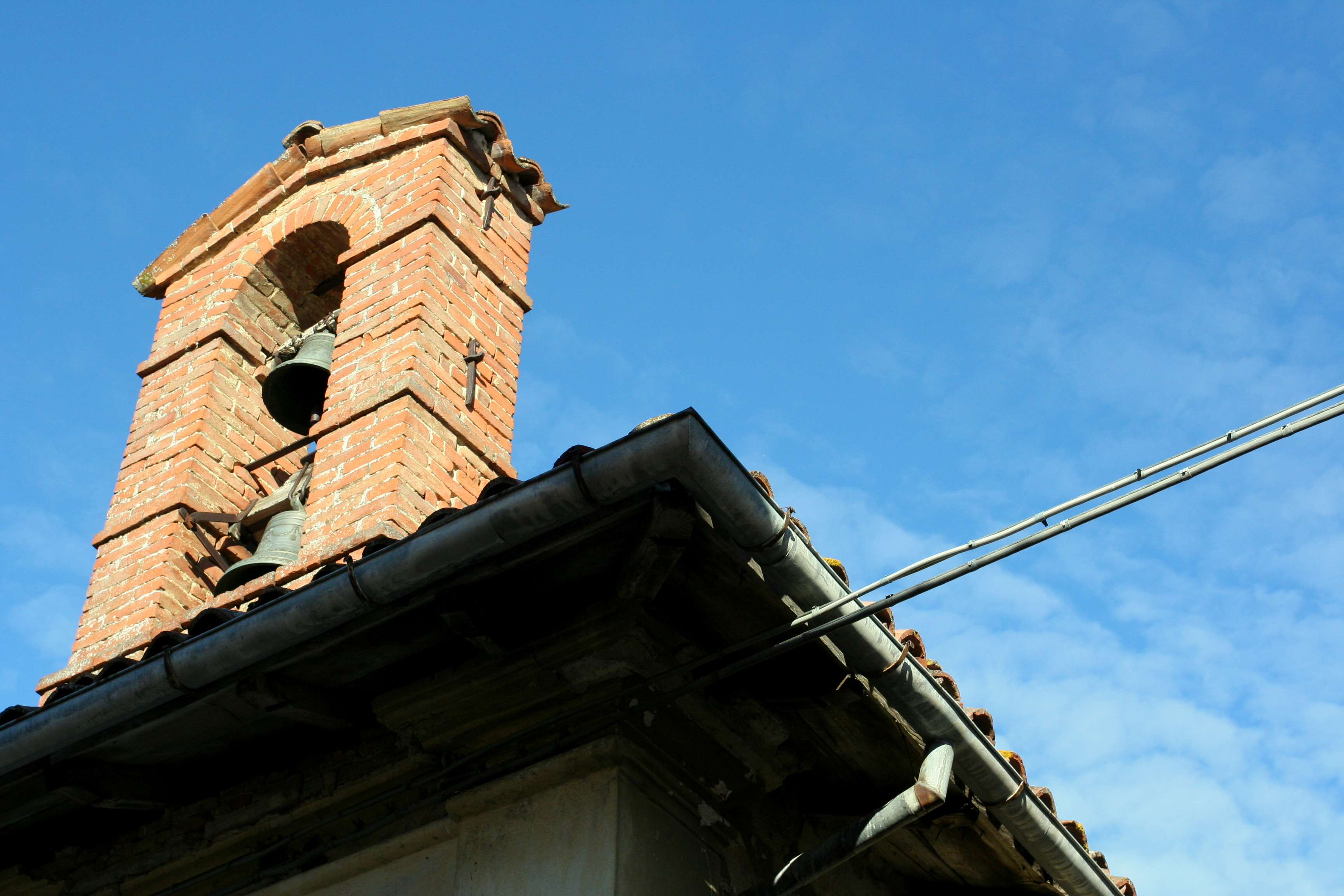 Casali della Meta, frazione del Comune di Amatrice: particolare del campanile a vela della chiesa di San Michele Arcangelo.